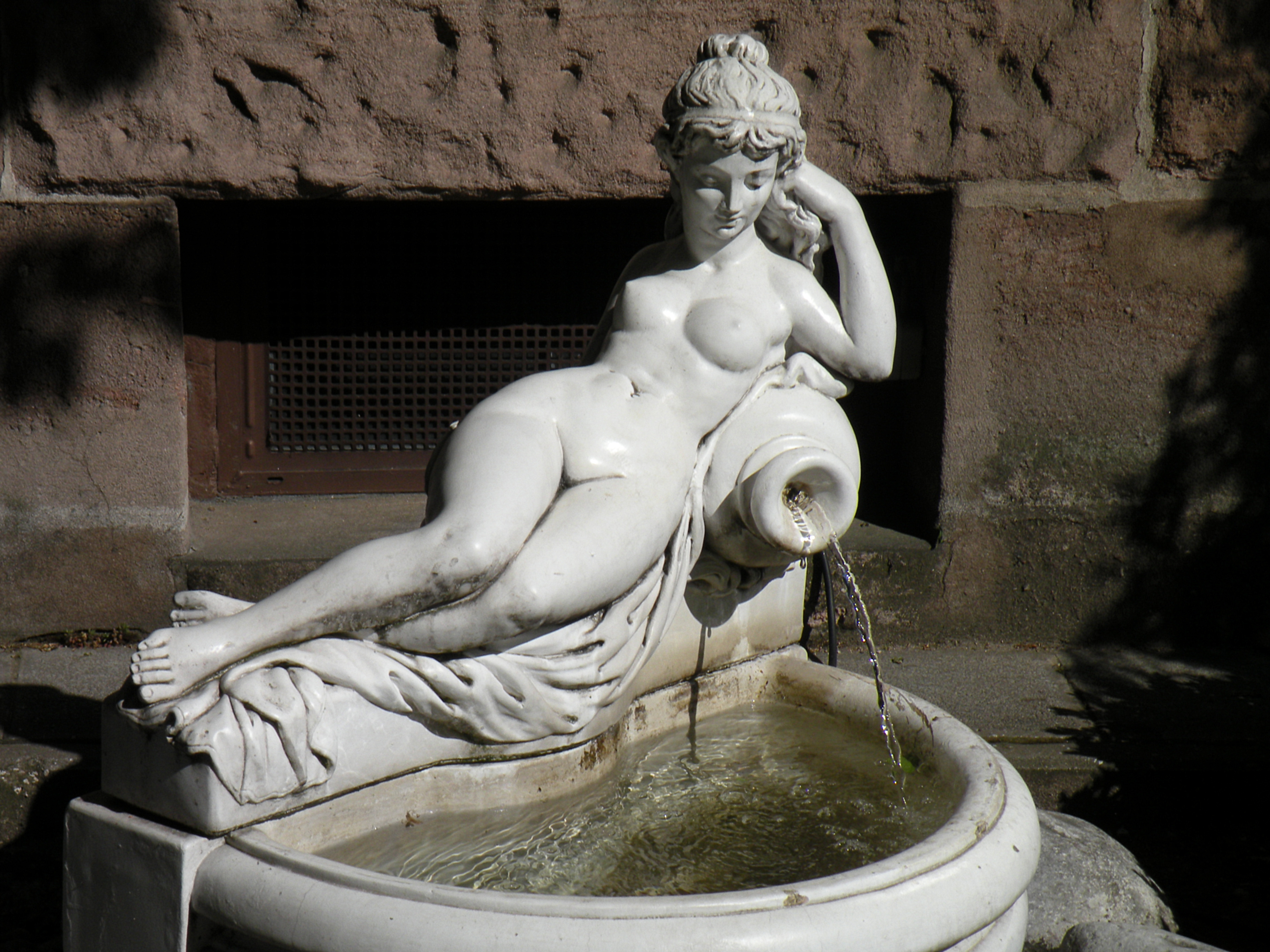 Drinking water. Nuremberg